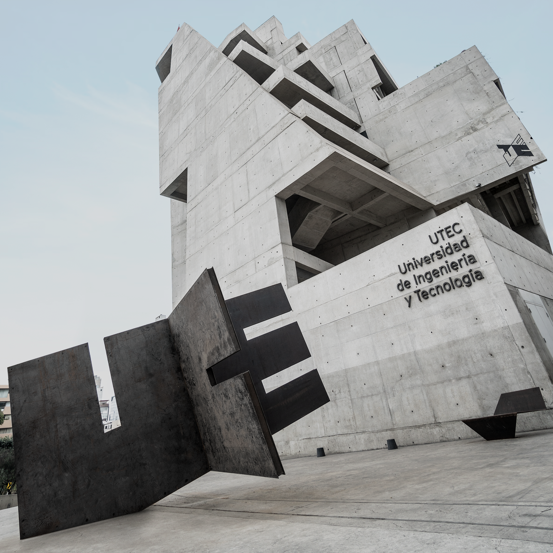 Campus de la Universidad de Ingeniería y Tecnología (UTEC) en Barranco, Lima.